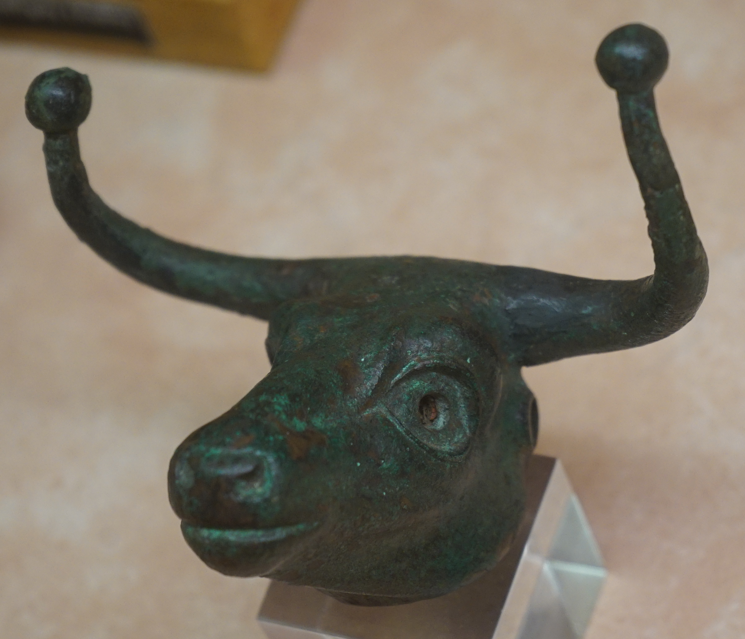 exposée dans la salle archéologique du sous-sol. Tête trouvée vers 1864 à la TOmbelle d'Aulnay et exposé sous le N°715 dans la section Histoire du travail de l'exposition universelle de 1867.